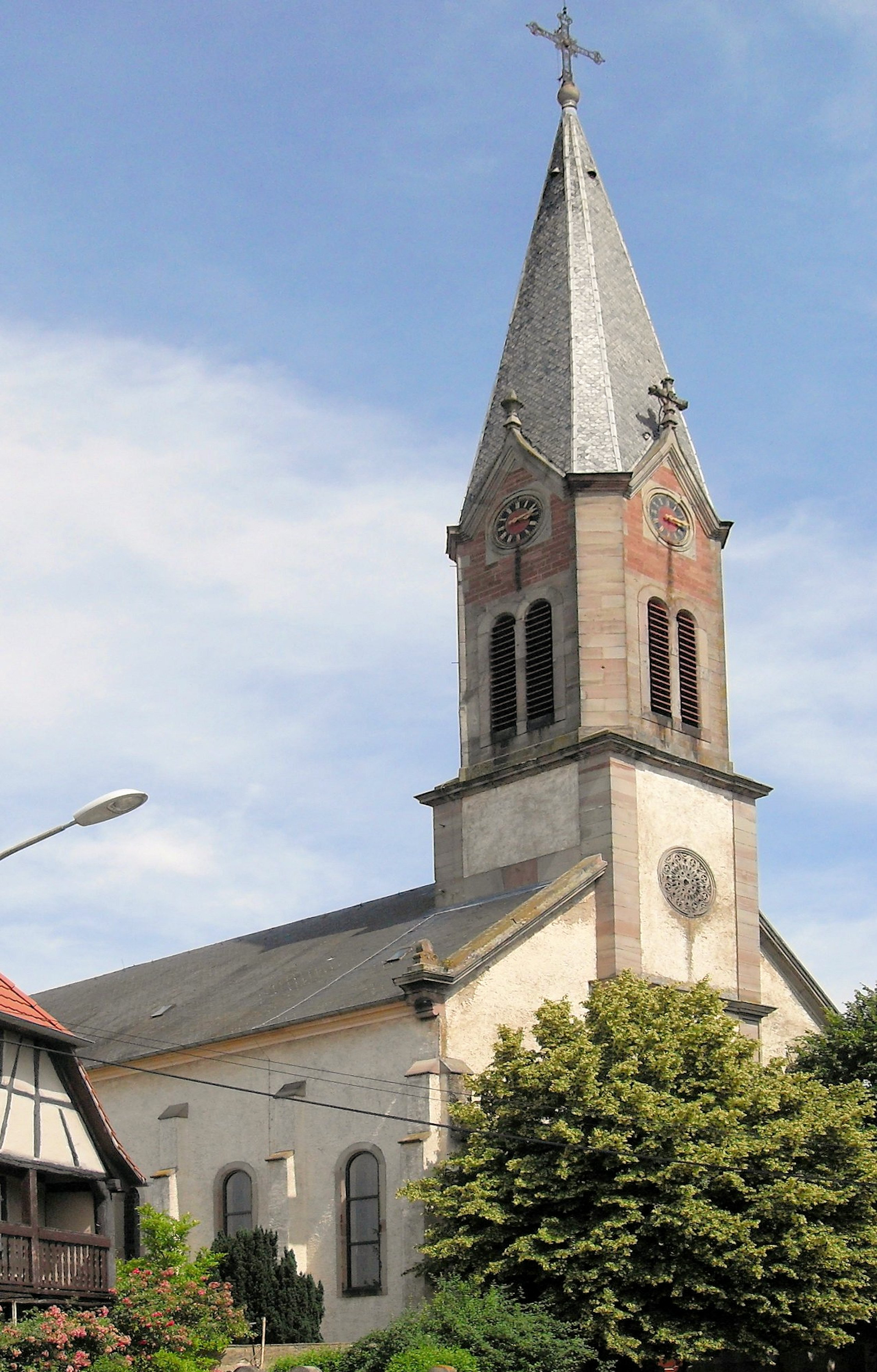 L'église Saint-Nicolas à Widensolen